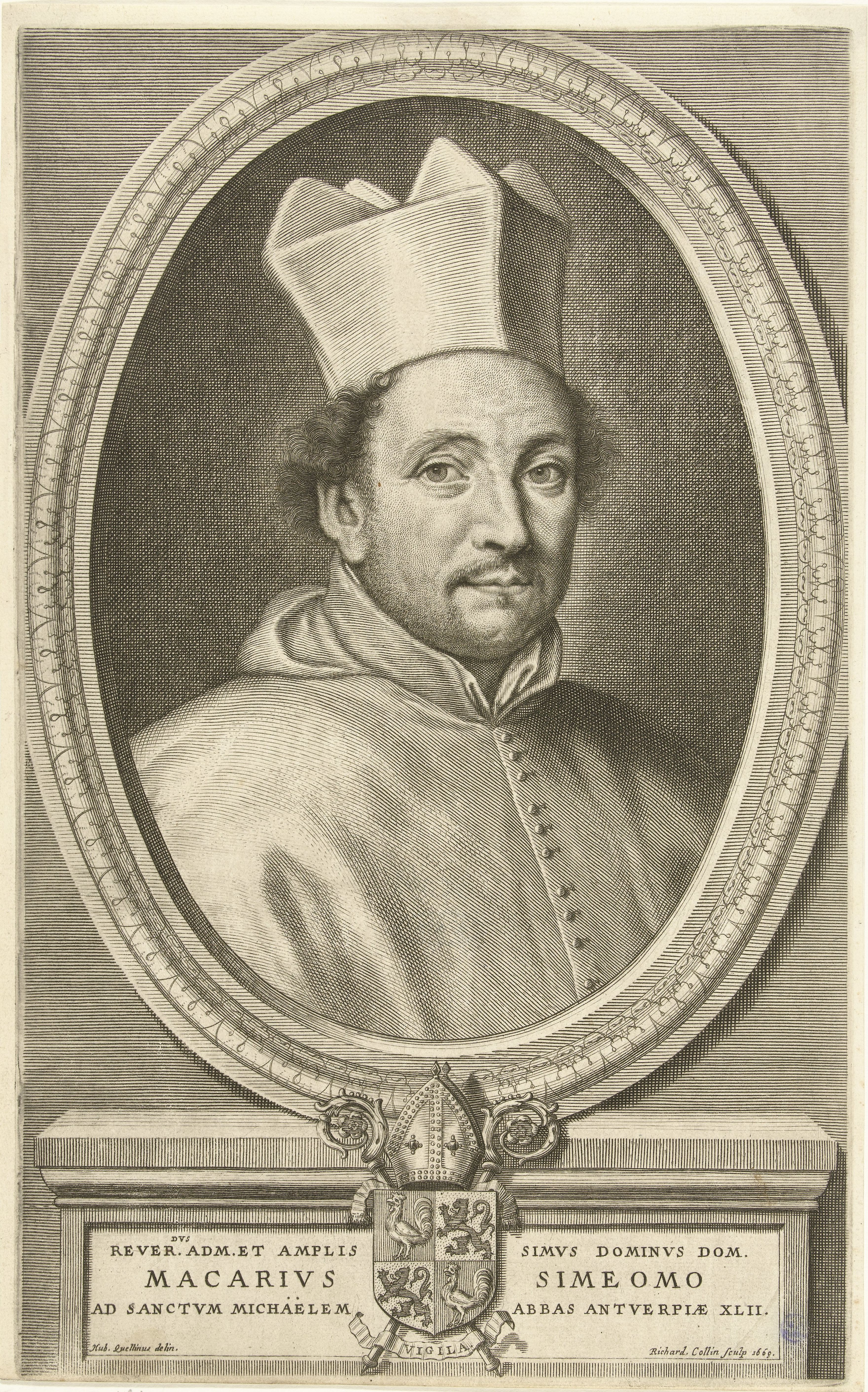 IdentificatieTitel(s): Portret van de Antwerpse abt Macarius SimeomoObjecttype: prent Objectnummer: RP-P-1905-161Catalogusreferentie: Hollstein Dutch 22Van Someren 5121Opschriften / Merken: verzamelaarsmerk, verso, gestempeld: Lugt 2228verzamelaarsmerk, verso, gestempeld: Lugt 1337Omschrijving: Borstbeeld van de abt met baret, in ovaal. Onder het portret zijn naam, familiewapen en titels.VervaardigingVervaardiger: prentmaker: Richard Collin (vermeld op object)naar tekening van: Hubert Quellinus (vermeld op object)Plaats vervaardiging: AntwerpenDatering: 1669Fysieke kenmerken: gravureMateriaal: papier Techniek: graveren (drukprocedé)Afmetingen: plaatrand: h 297 mm × b 186 mmOnderwerpWat: abbotWie: Macarius SimeomoVerwerving en rechtenCredit line: Schenking van de heer C. ScheiblerVerwerving: schenking 1905Copyright: Publiek domein